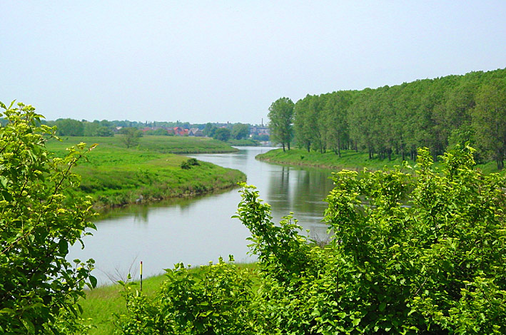 Bick vom Mägdesprung bei Calbe (Saale), Deutschland